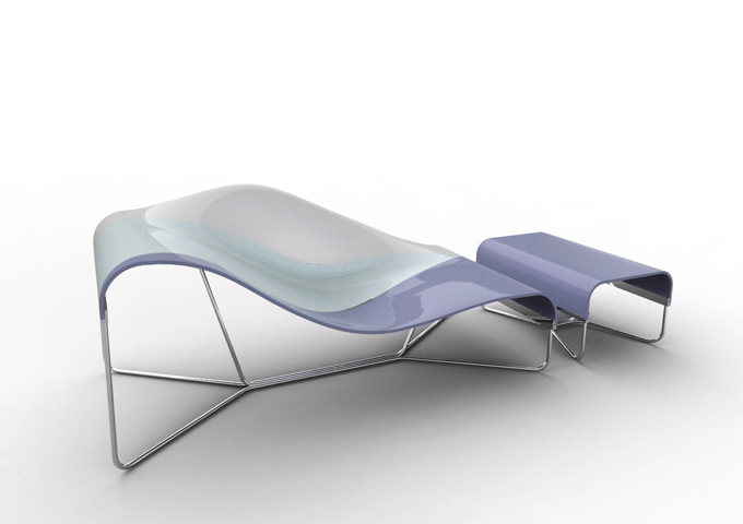 RUNON